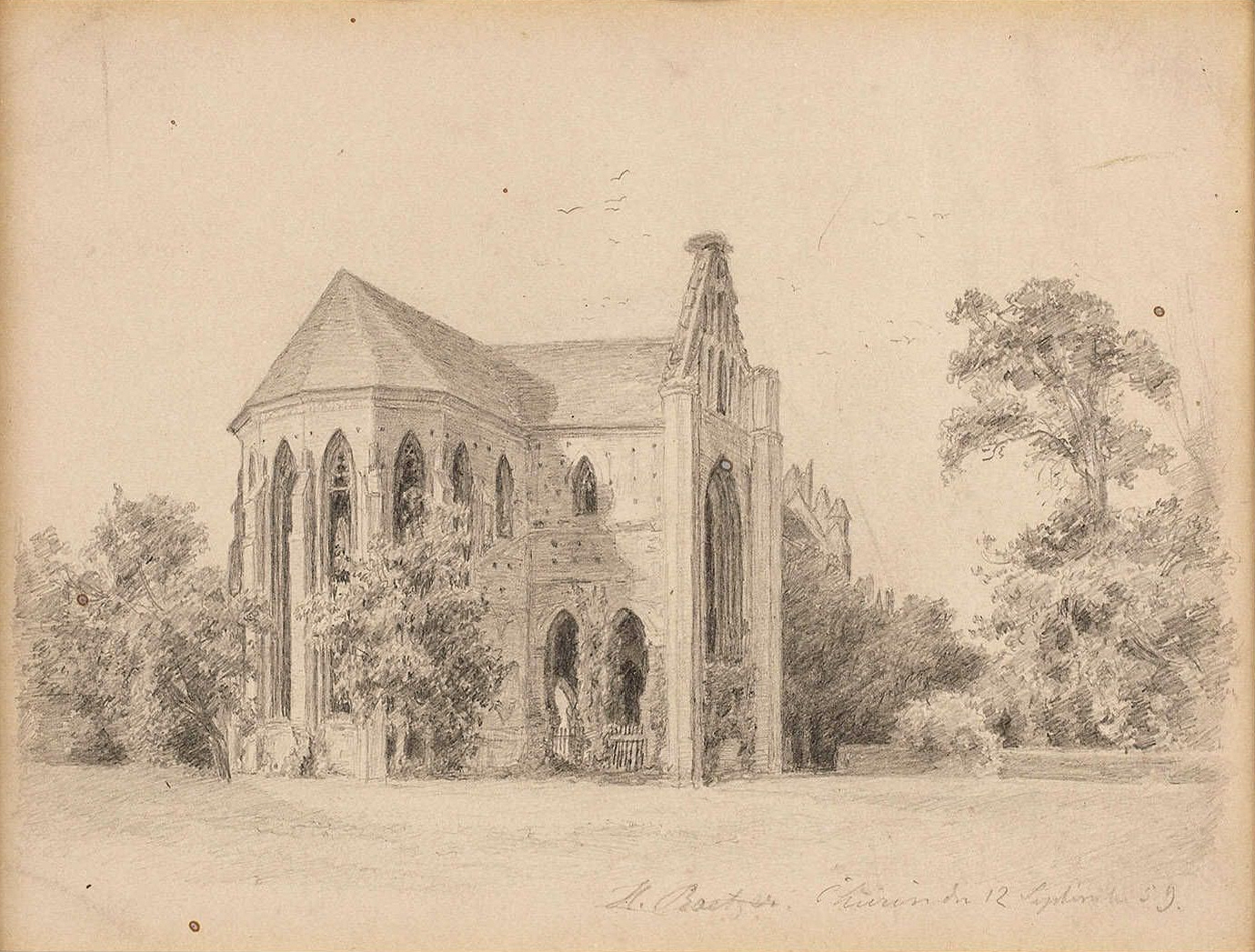 "Zisterzienserabtei Chorin", signiert "H. Raetzer Churin den 12 September 59", 15,5 x 20,5 cm